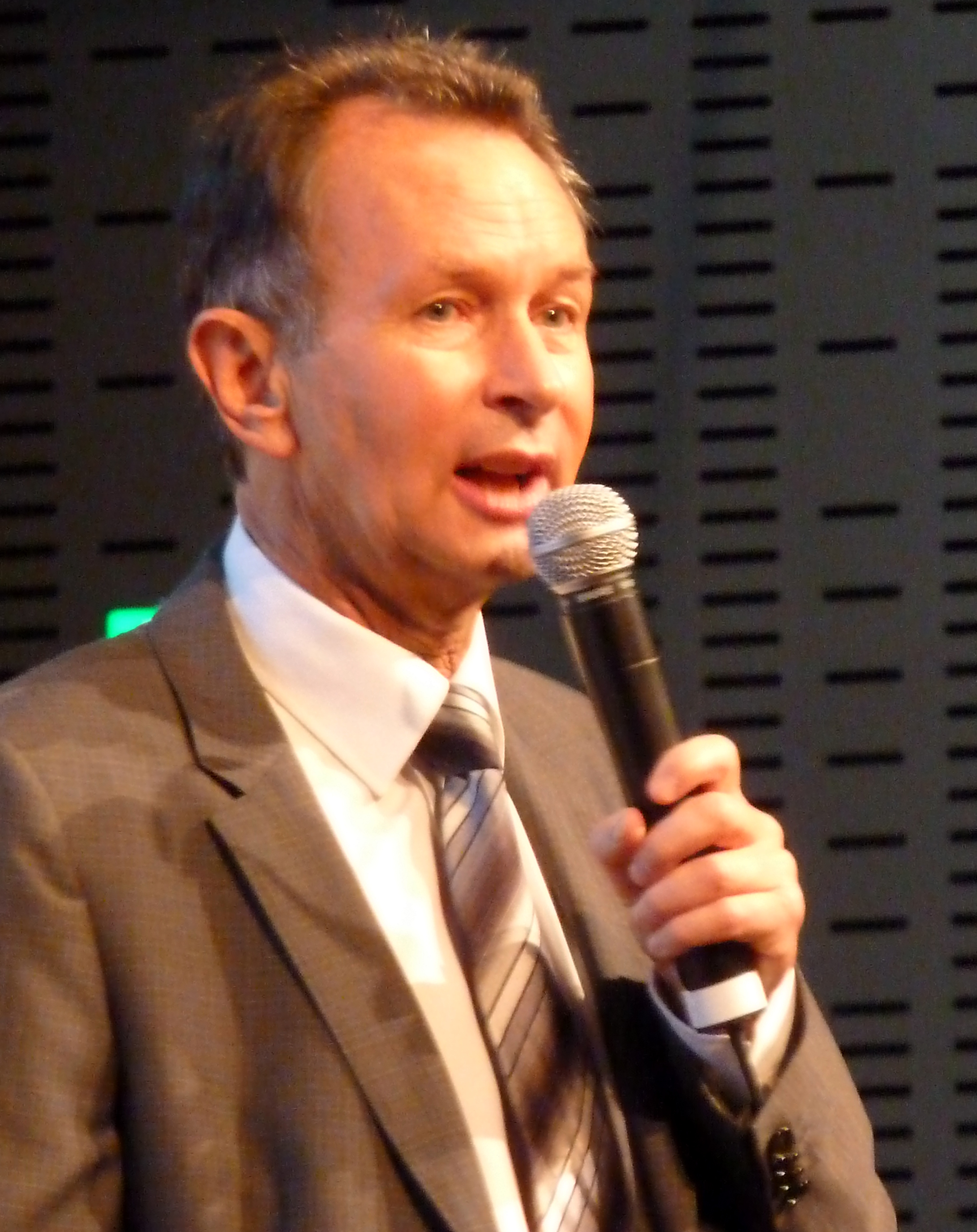 Nationalrat Philipp Müller, Präsident der FDP.Die Liberalen Schweiz, redet zu den Delegierten seiner Partei.